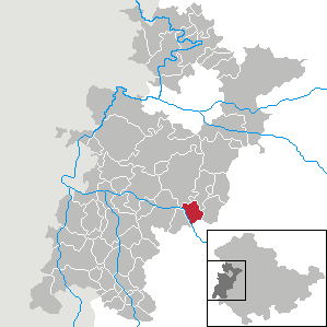 Barchfeld in Thuringia - Wartburgkreis